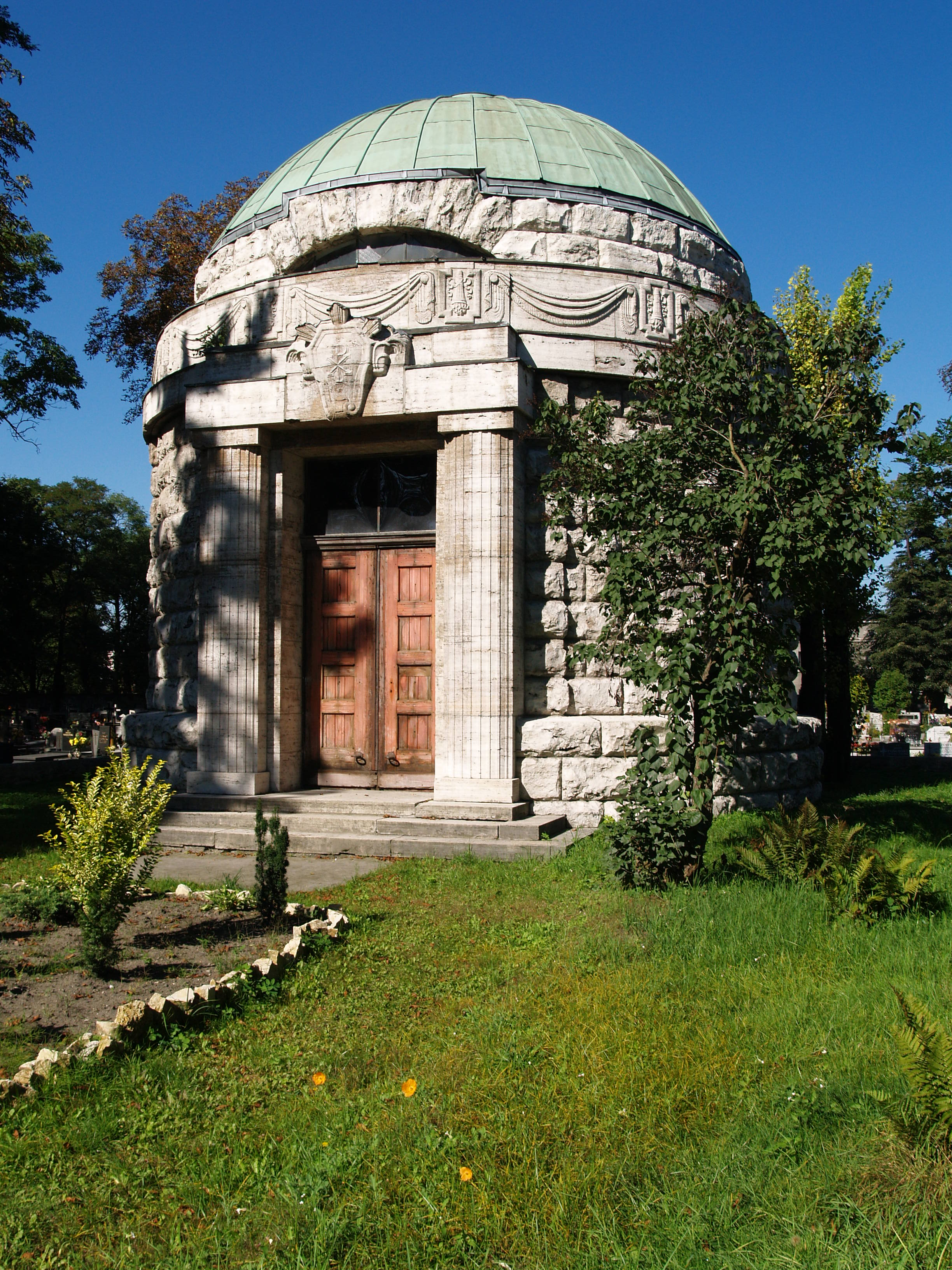 Mauzoleum rodziny Dietlów na cmentarzu ewangelicko-augsburskim w Sosnowcu. Obecnie kaplica cmentarna.